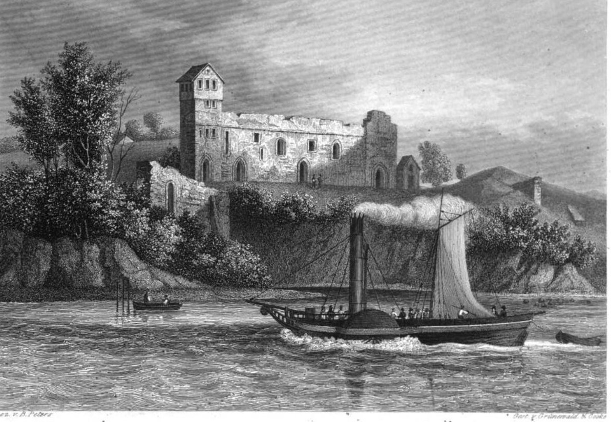 Ruinen des Schlosses Balga an der Ostküste des Frischen Haffs in Ostpreußen, Stahlstich nach einer Zeichnung von B. Peters